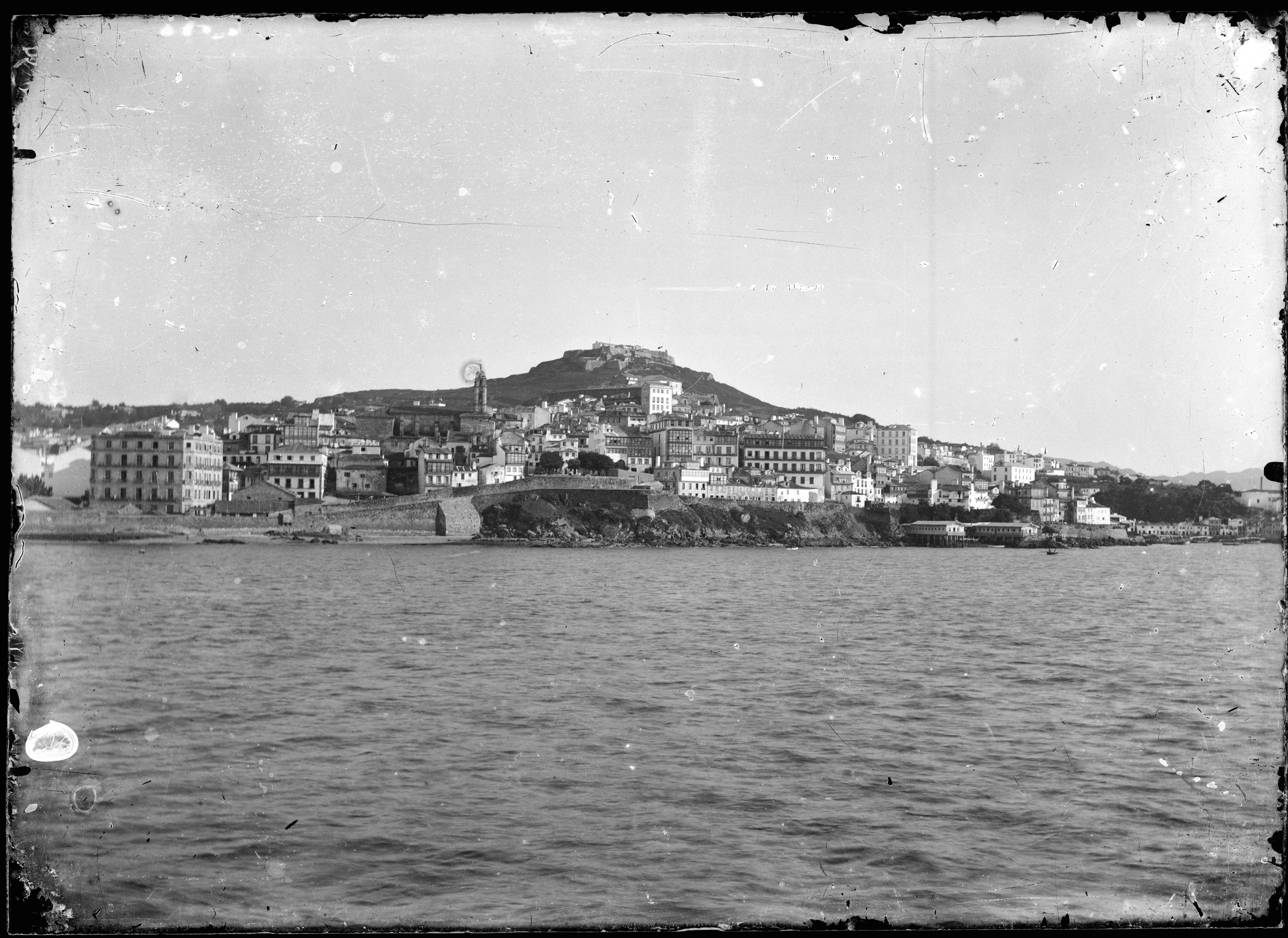 Vigo.[1]